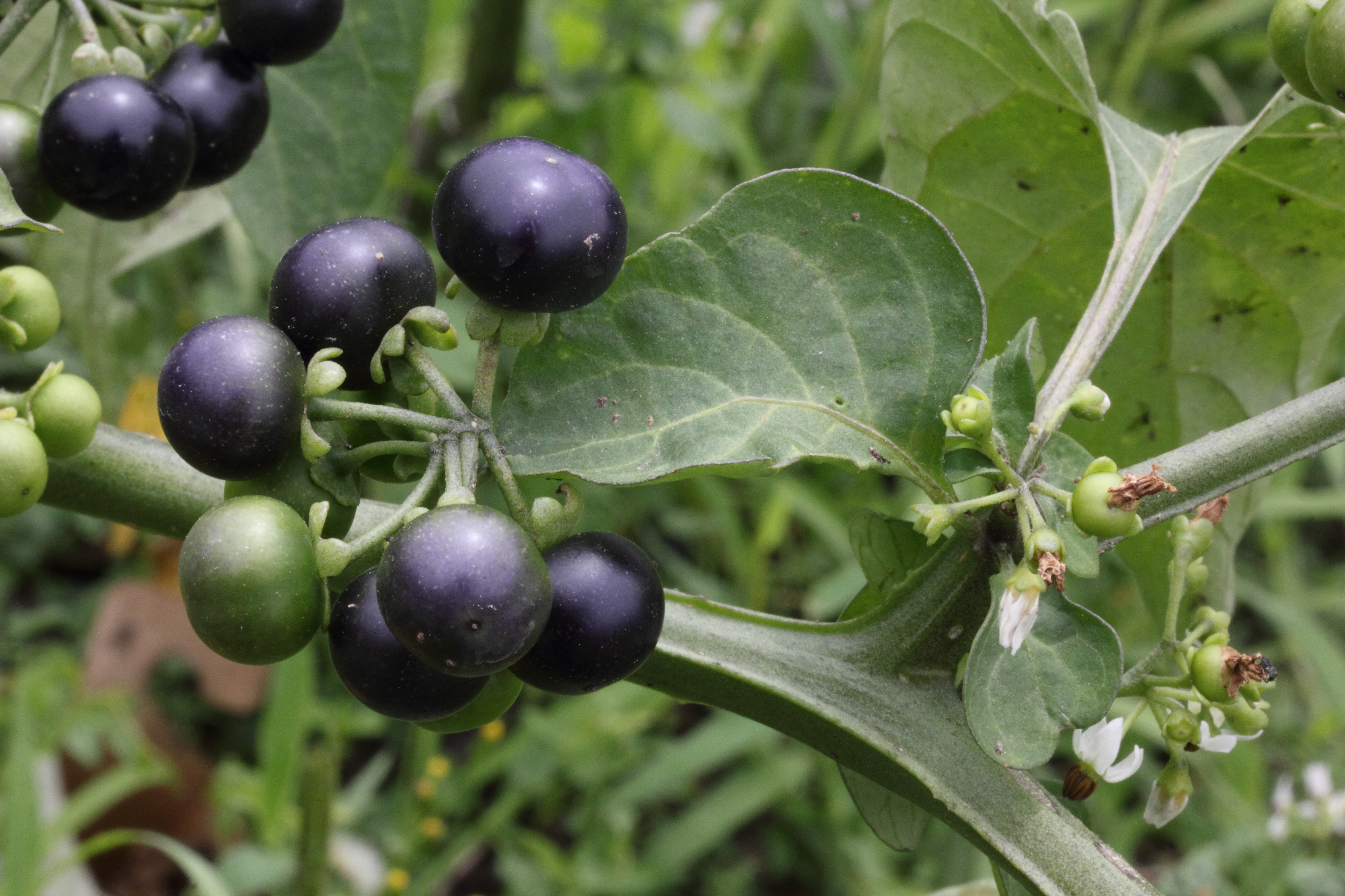 Muséum de Toulouse Native nameMuséum de ToulouseLocationToulouse , FranceCoordinates43° 35′ 38″ N, 1° 26′ 57″ E Established1796: established ; 1865: opened to publicWeb page control : Q422 VIAF: 130895847 ISNI: 0000 0001 2158 3469 SUDOC: 028667107 BNF: 120455376 Museofile: M7013 institution QS:P195,Q422